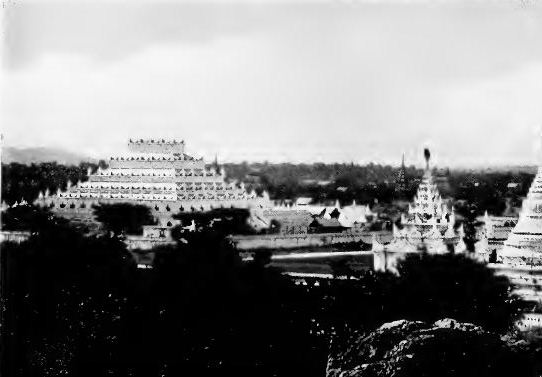 Atumashi Monastery, Mandalay